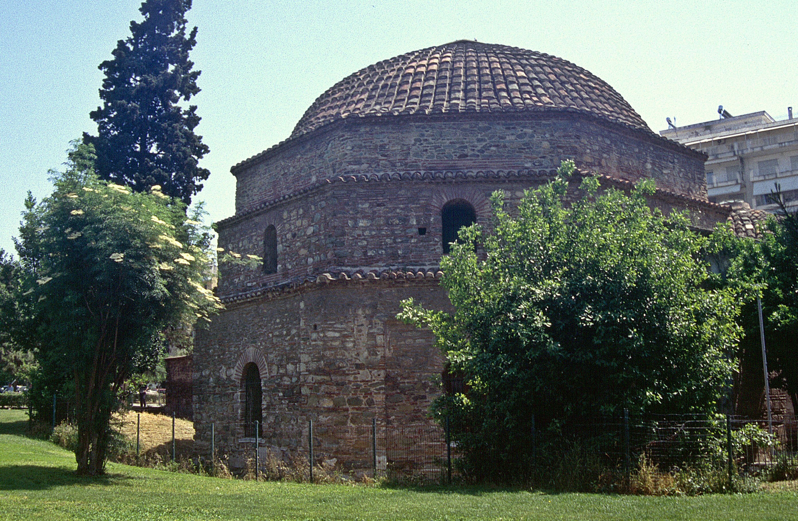 Thessaloniki: Bey Hamam